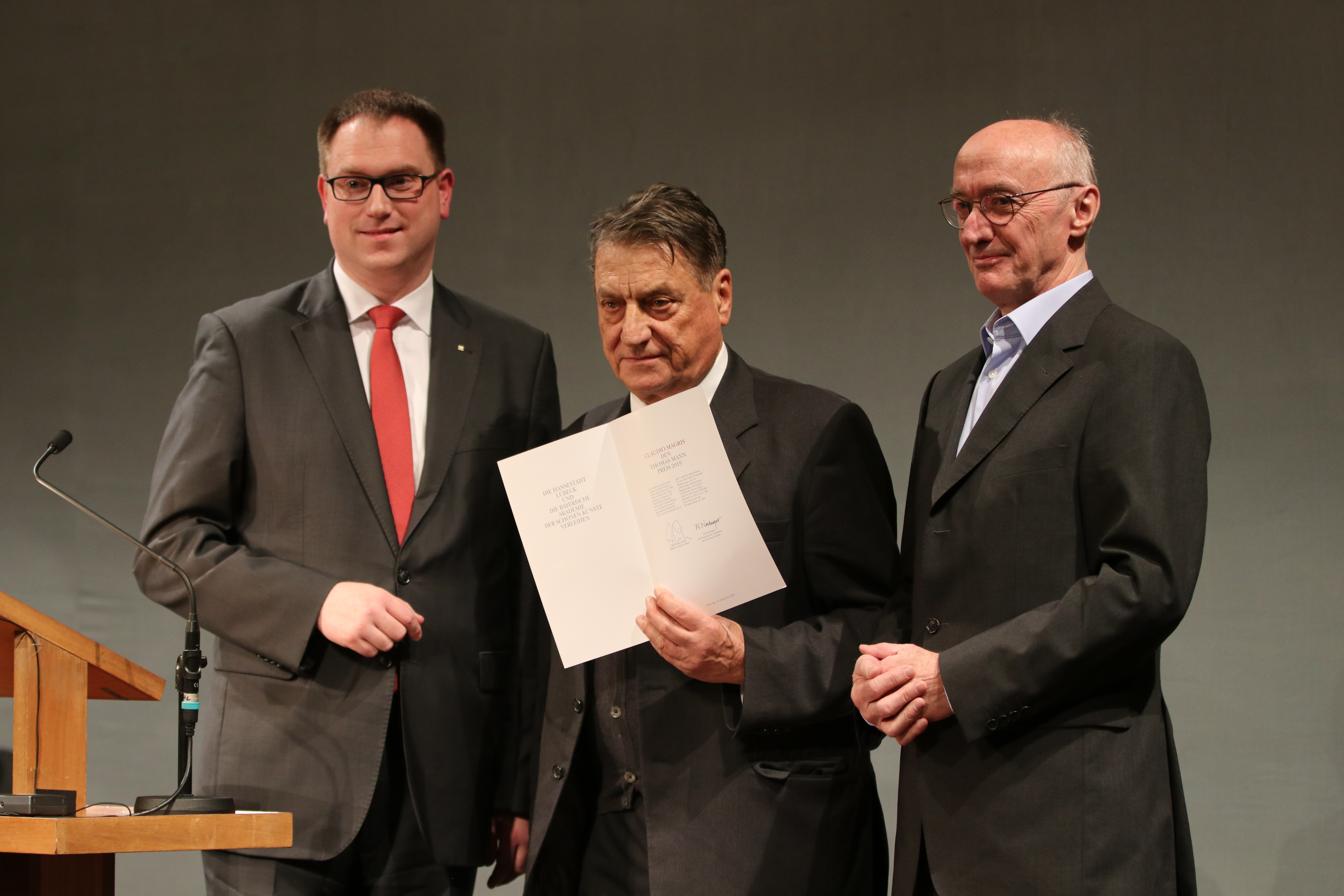 Der Thomas-Mann-Preis 2019 an Claudio Magris (Mitte) wurde in der Bayerischen Akademie der Schönen Künste von Jan Lindenau, Bürgermeister der Hansestadt Lübeck, (links) und Winfried Nerdinger, Präsident der Akademie (rechts) verliehen.